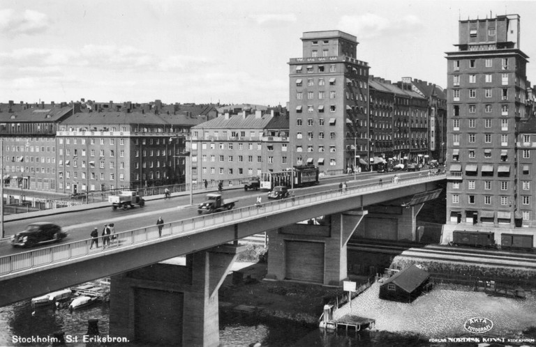 S.t Eriksbron mot nordväst innan tunnelbanebron tillkom